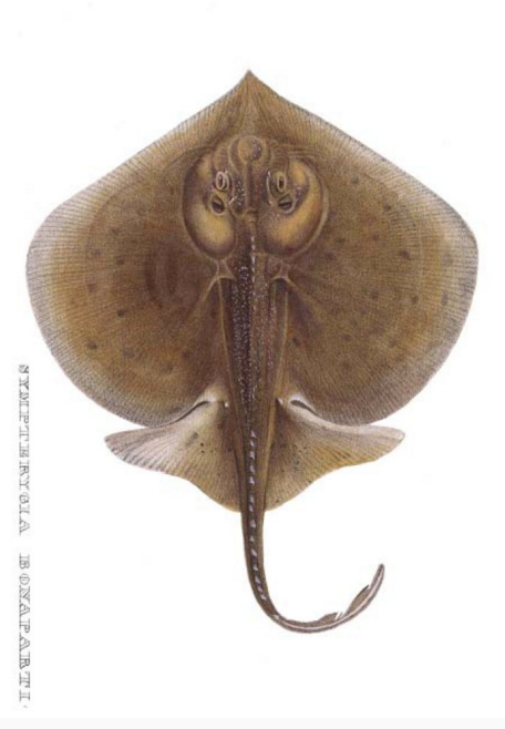 Старинное изображение слитнопёрого ската